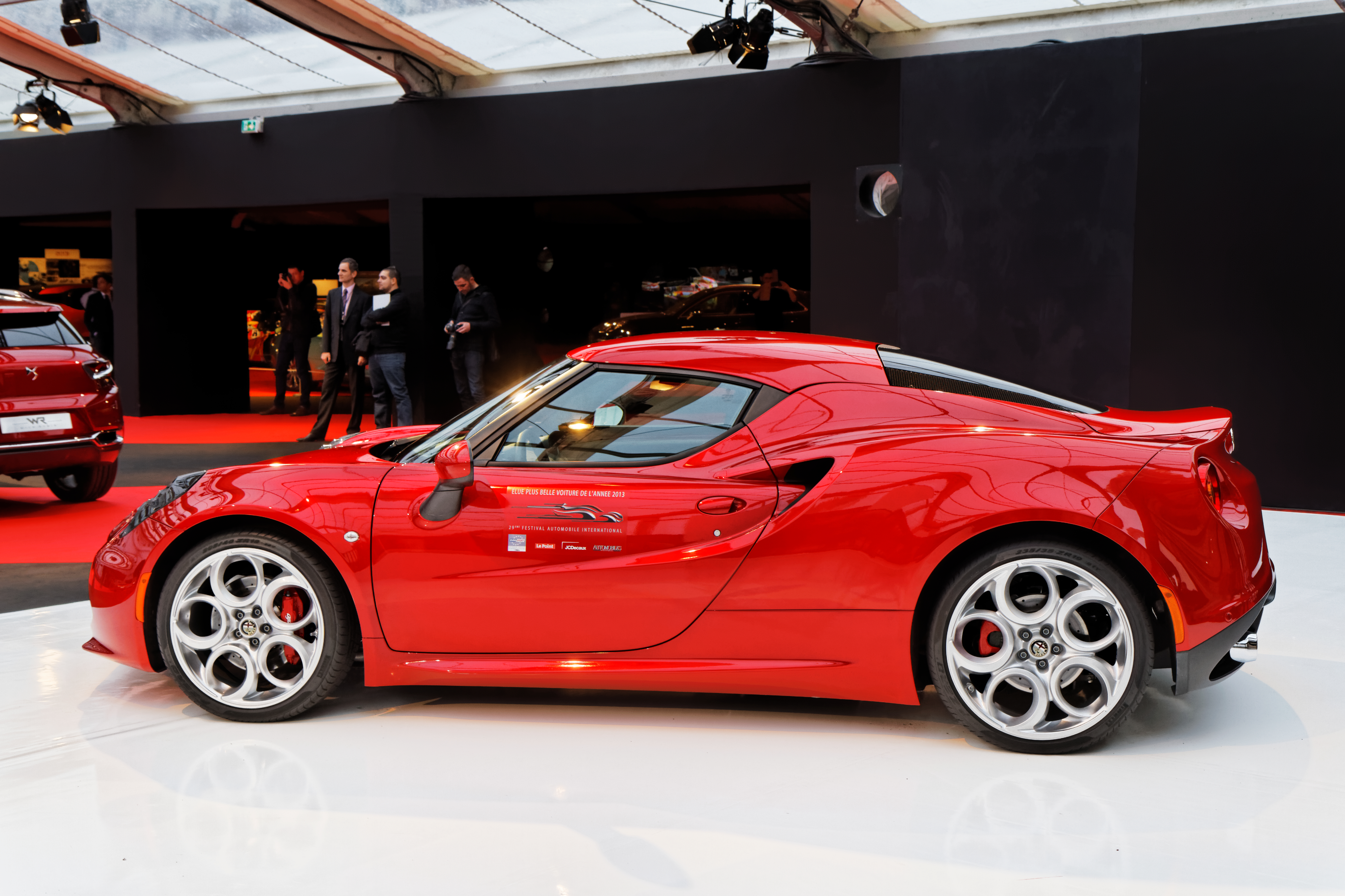 L'Alfa Romeo 4C exposée lors du festival automobile international 2014.